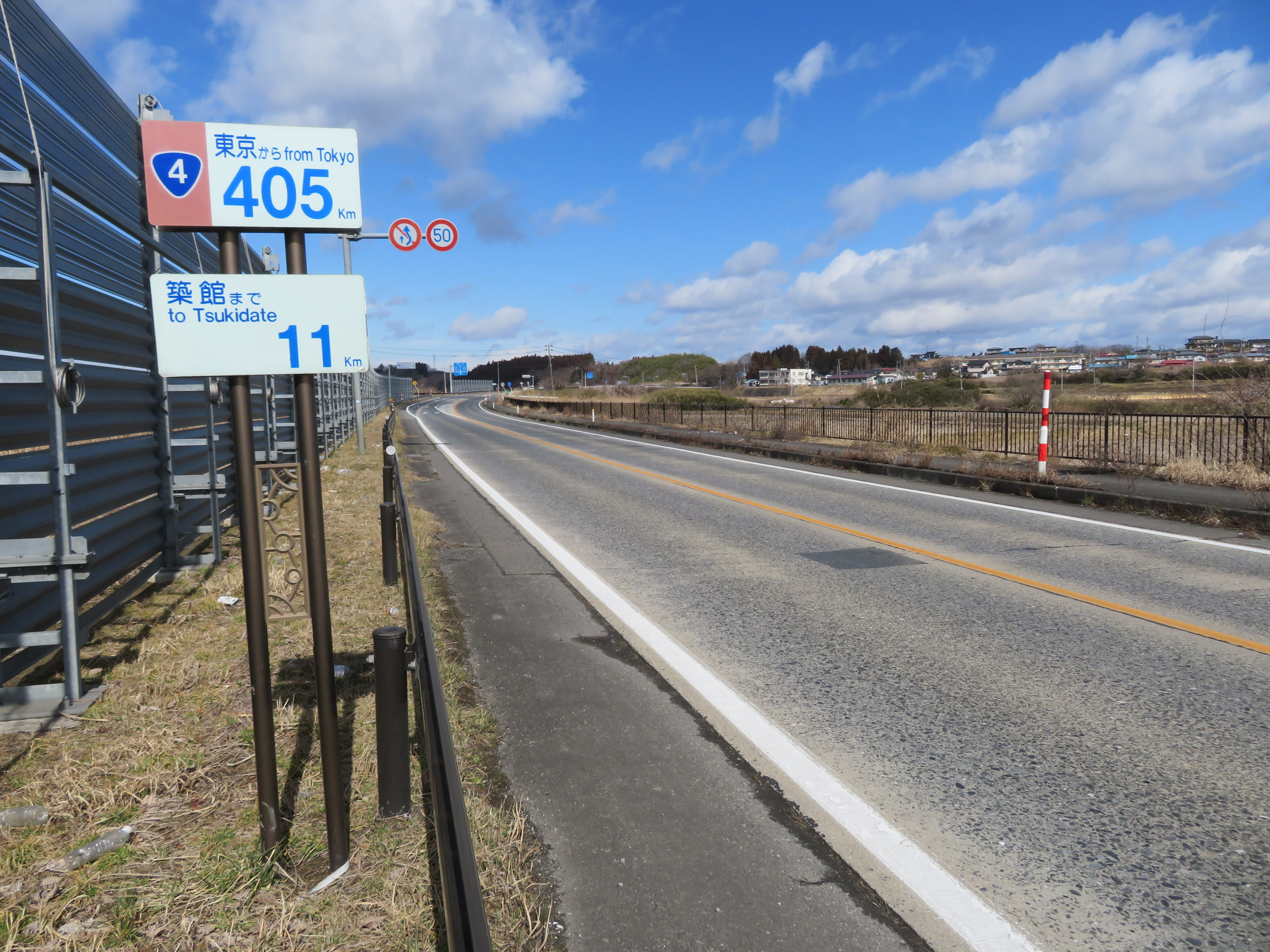 国道4号高清水バイパス 宮城県栗原市高清水高田付近（一関方面を撮影） Canon PowerShot SX720 HS